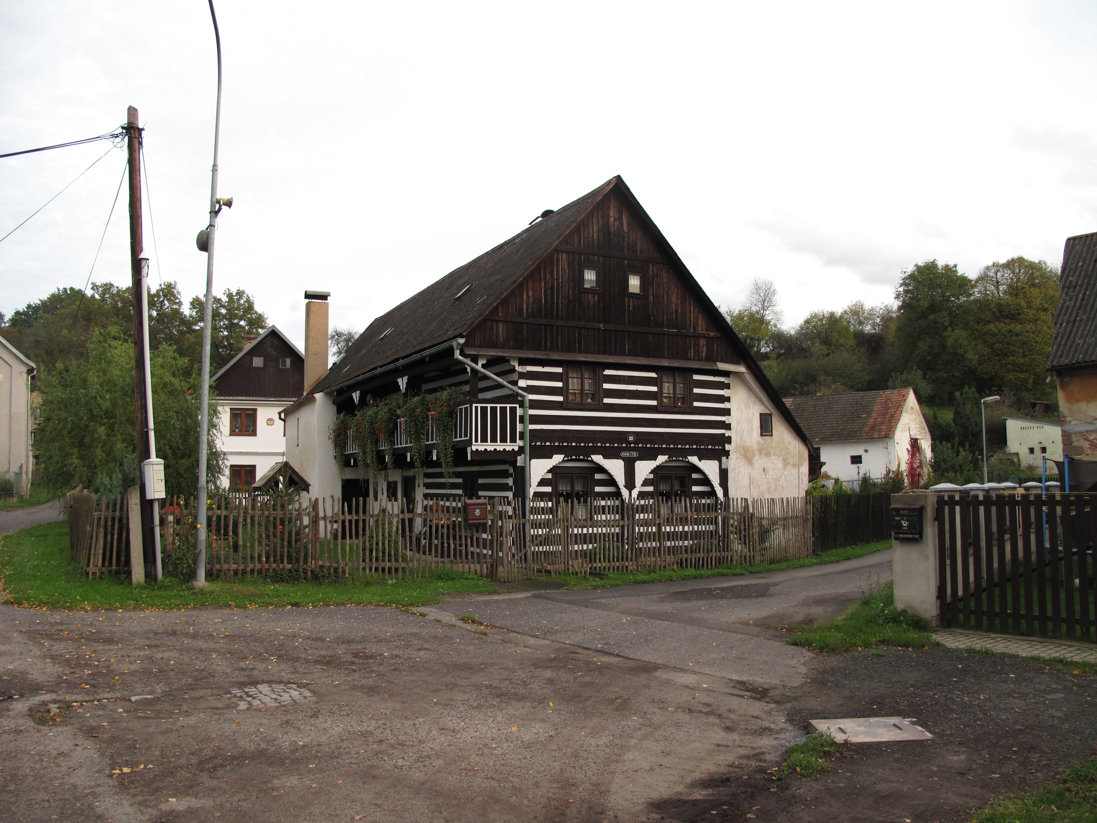 Roubenka ve Snědovicích. Okres Litoměřice, Česká republika.